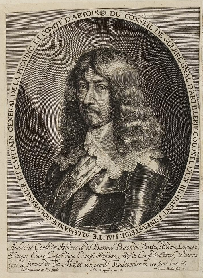 Grafik aus dem Klebeband Nr. 1 der Fürstlich Waldeckschen Hofbibliothek Arolsen Motiv: Ambrosius van Horne (1609-1656), General in spanischen Kriegsdiensten VIAF: 187433501 GND: 1015750656